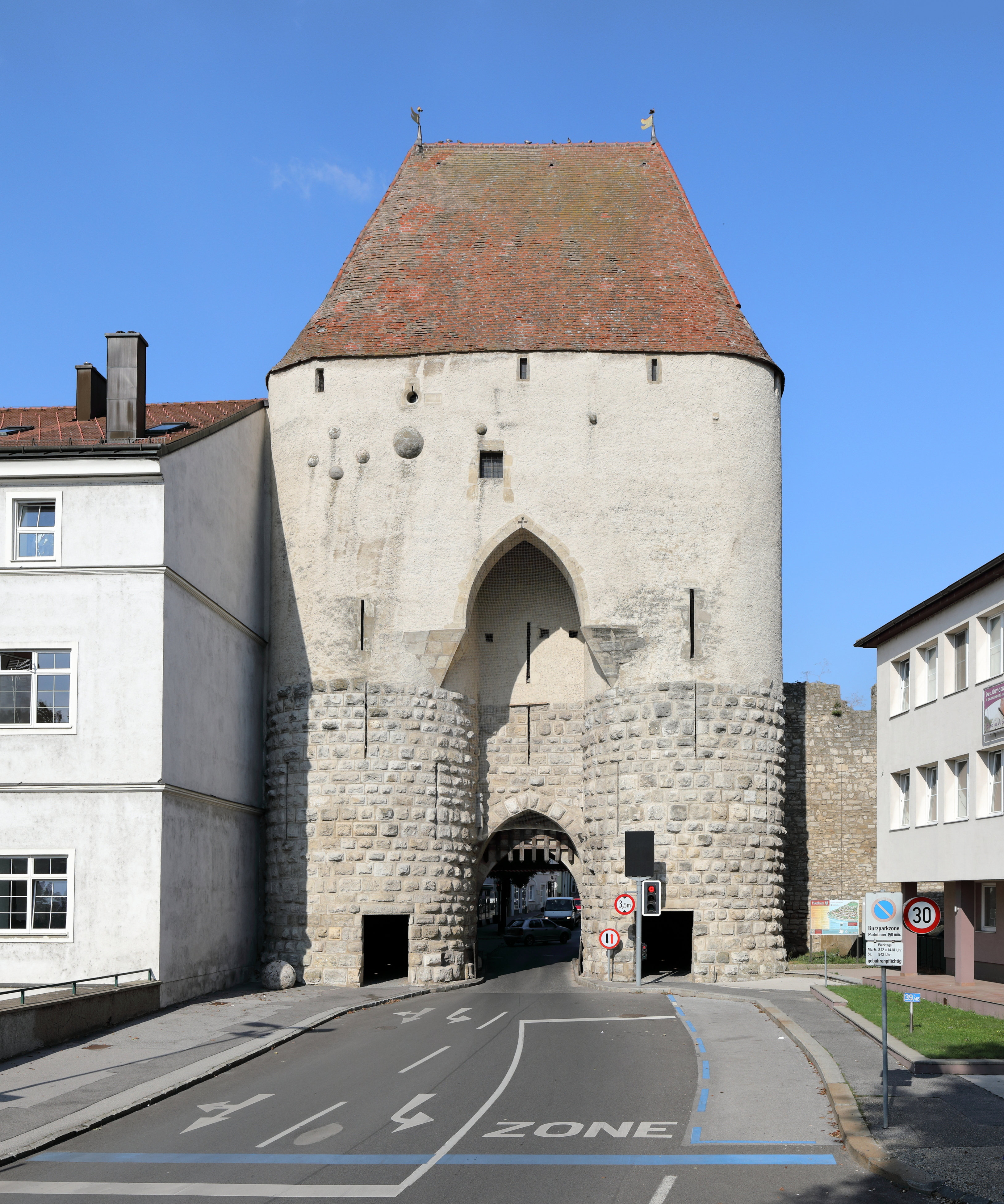 Südwestansicht des Wiener Tores in der niederösterreichische Stadtgemeinde Hainburg an der Donau.Das Tor wurde um 1230/40 errichtet und ist österr. bedeutendstes Stadttor des 13. Jahrhunderts. Ein paar Jahrzehnte später wurde es um 2 Wehrgeschosse erhöht. Im 16. Jahrhundert wurde unter anderem der Wehrgang abgetragen und das neue Dachwerk aufgesetzt. Ende des 19. und Anfang des 20. Jahrhundert erfolgte der Ausbruch der 2 Fußgängerdurchgängen.